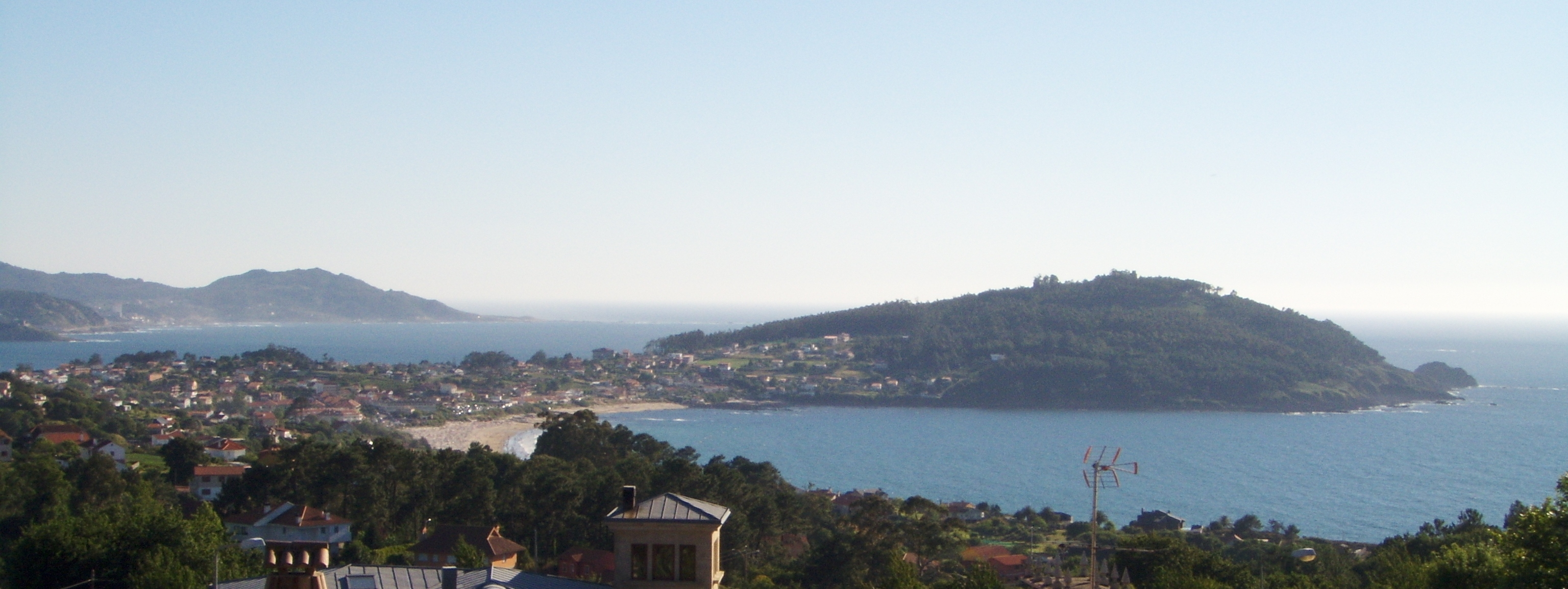 Á dereita a península de Monteferro (Panxón, Nigrán) e , lonxe, ó fondo, á esquerda, cabo Silleiro (Baiona). Tomada dende o adro da igrexa de Saiáns (Vigo).